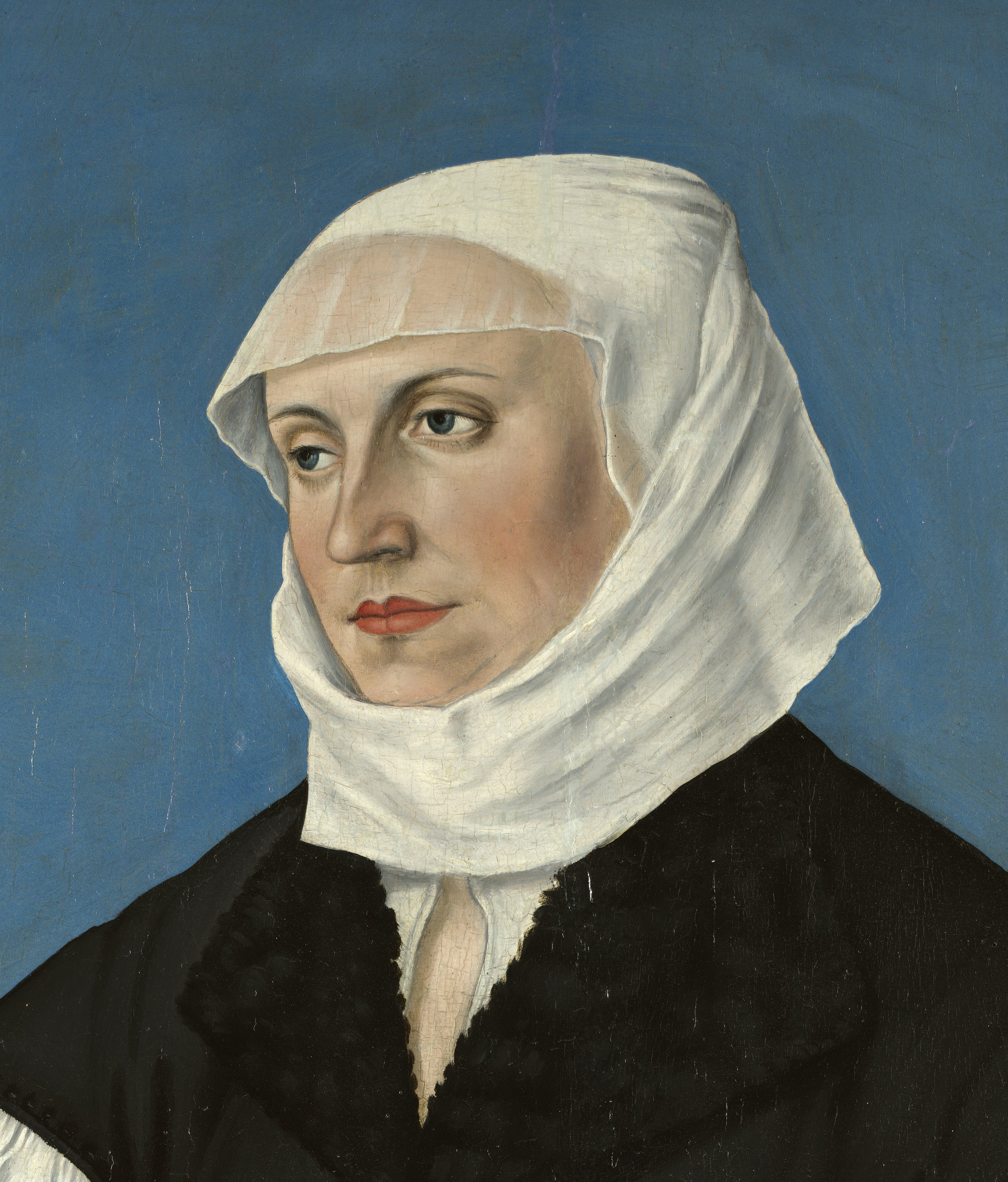 Regula Gwalter-Zwingli, die Tochter von Ulrich Zwingli und Anna Reinhart (Ausschnitt)